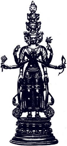 Бодхисатва Авалокитешвара (обычный вид).